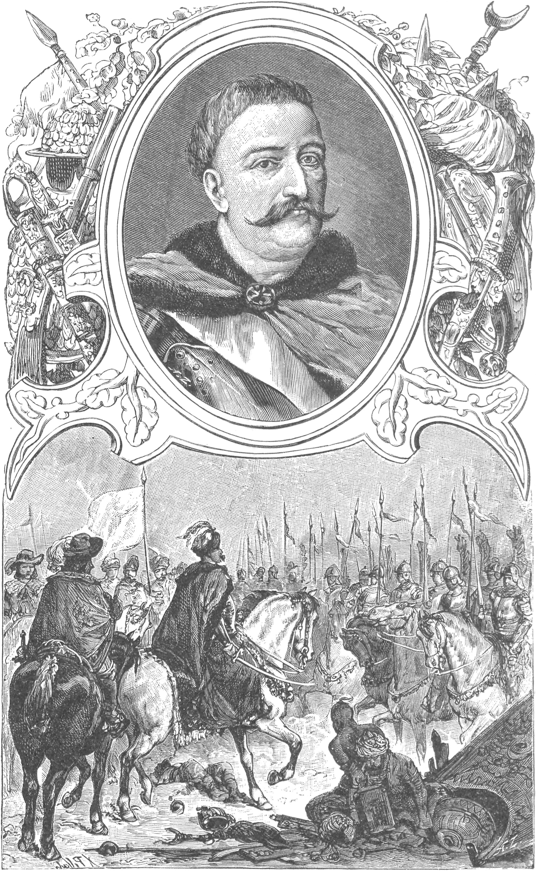 ilustracja z książki „Wizerunki książąt i królów polskich“